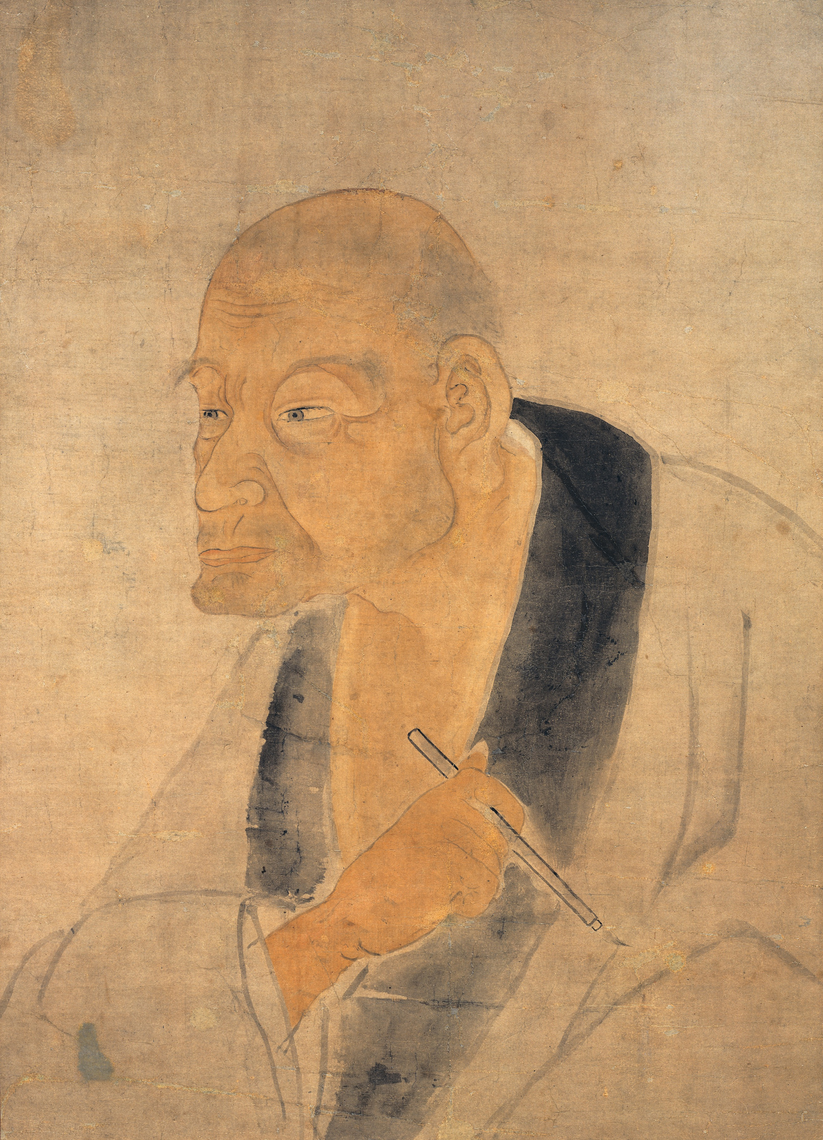 狩野探幽 (Kanō Tan'yū)（1602-74）